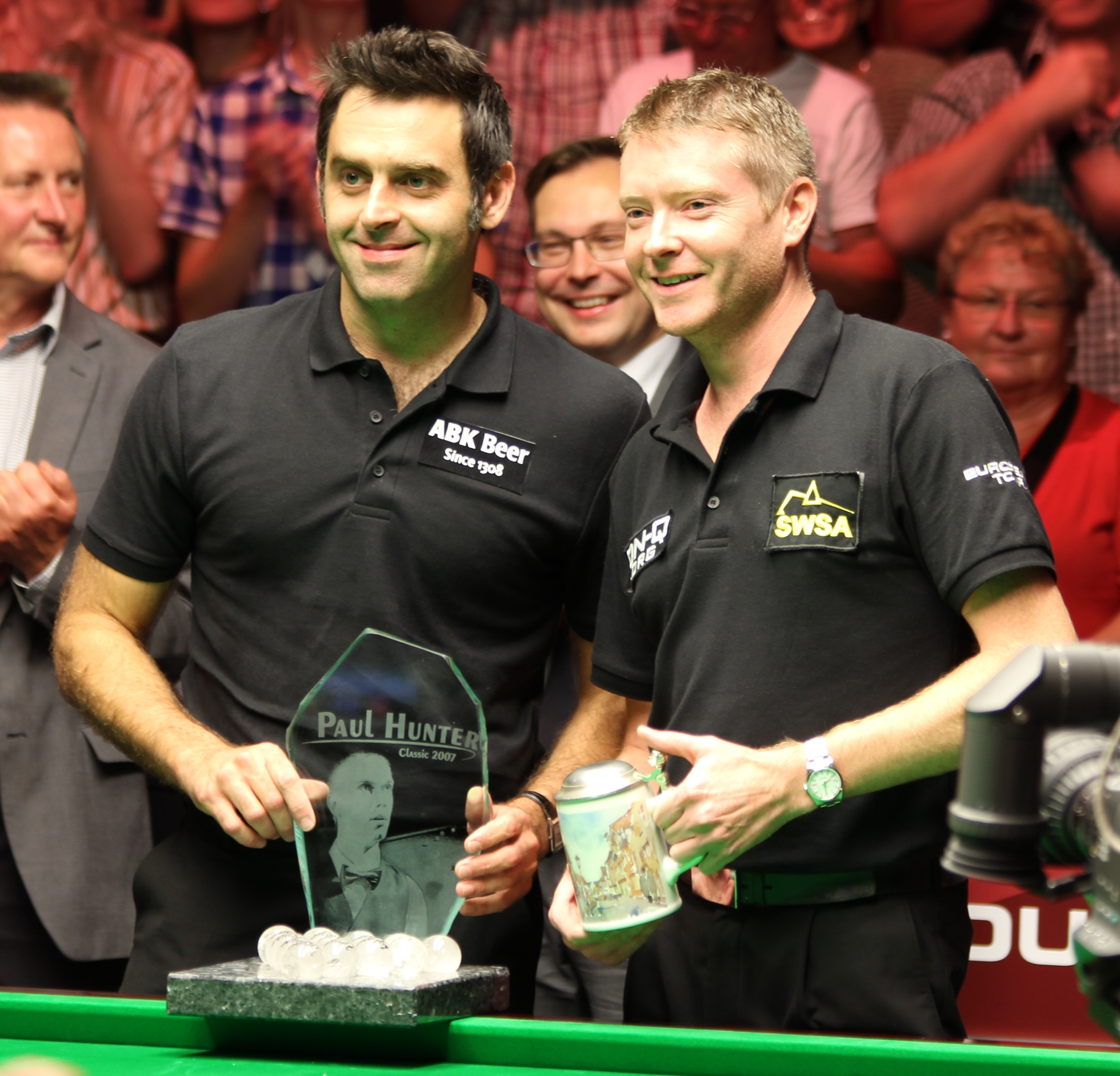 Siegerehrung Paul Hunter Classic 2013, Ronnie O'Sullivan und Gerard Greene